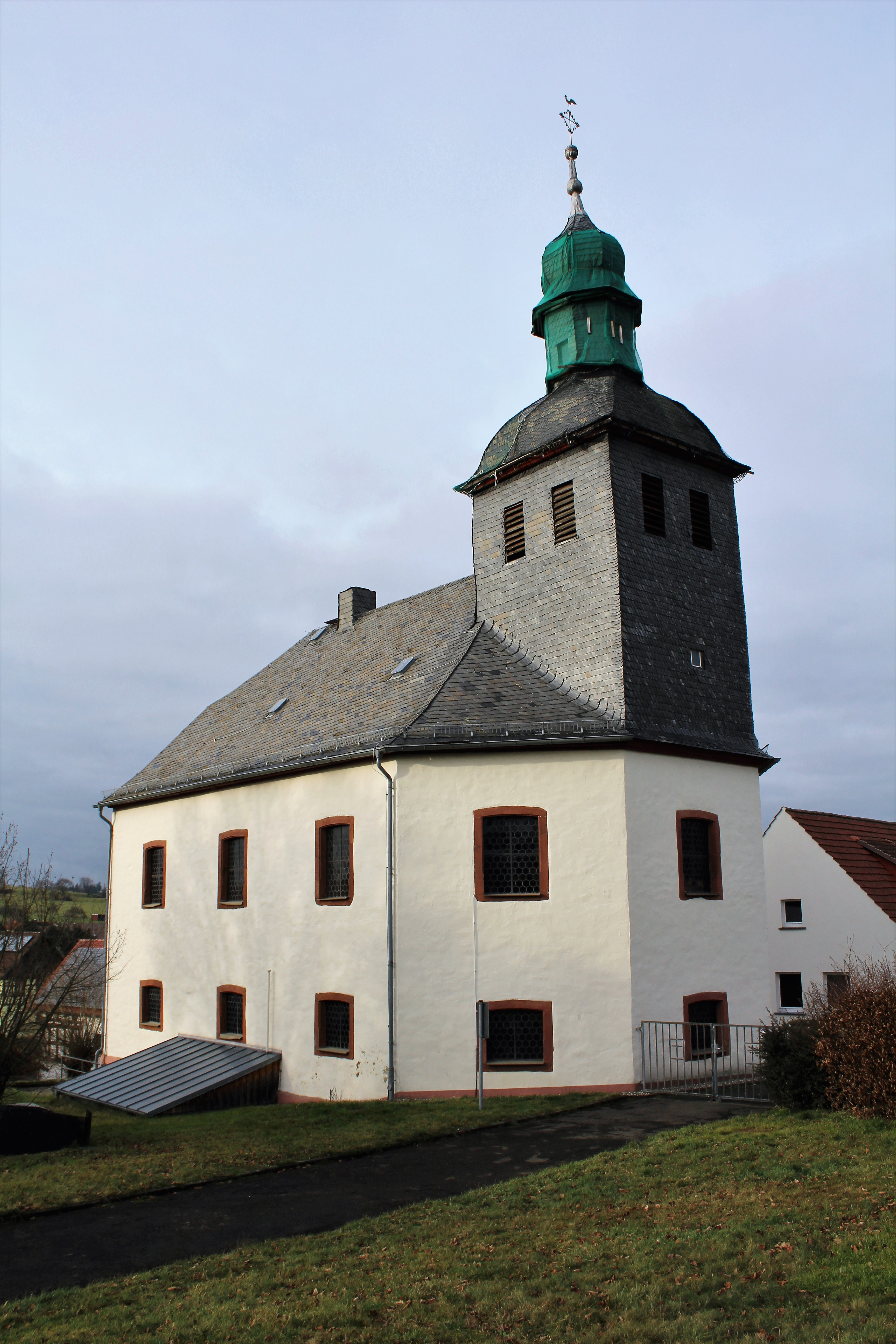 Evangelische Kirche Groß-Eichen, Gemeinde Mücke, Vogelsbergkreis, Hessen, Deutschland